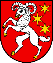 Wappen von Netstal Kanton Glarus Schweiz